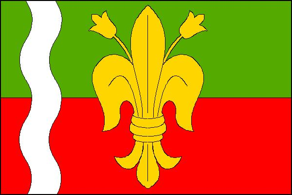 Vlajka obce Tuhaň (okres Mělník)